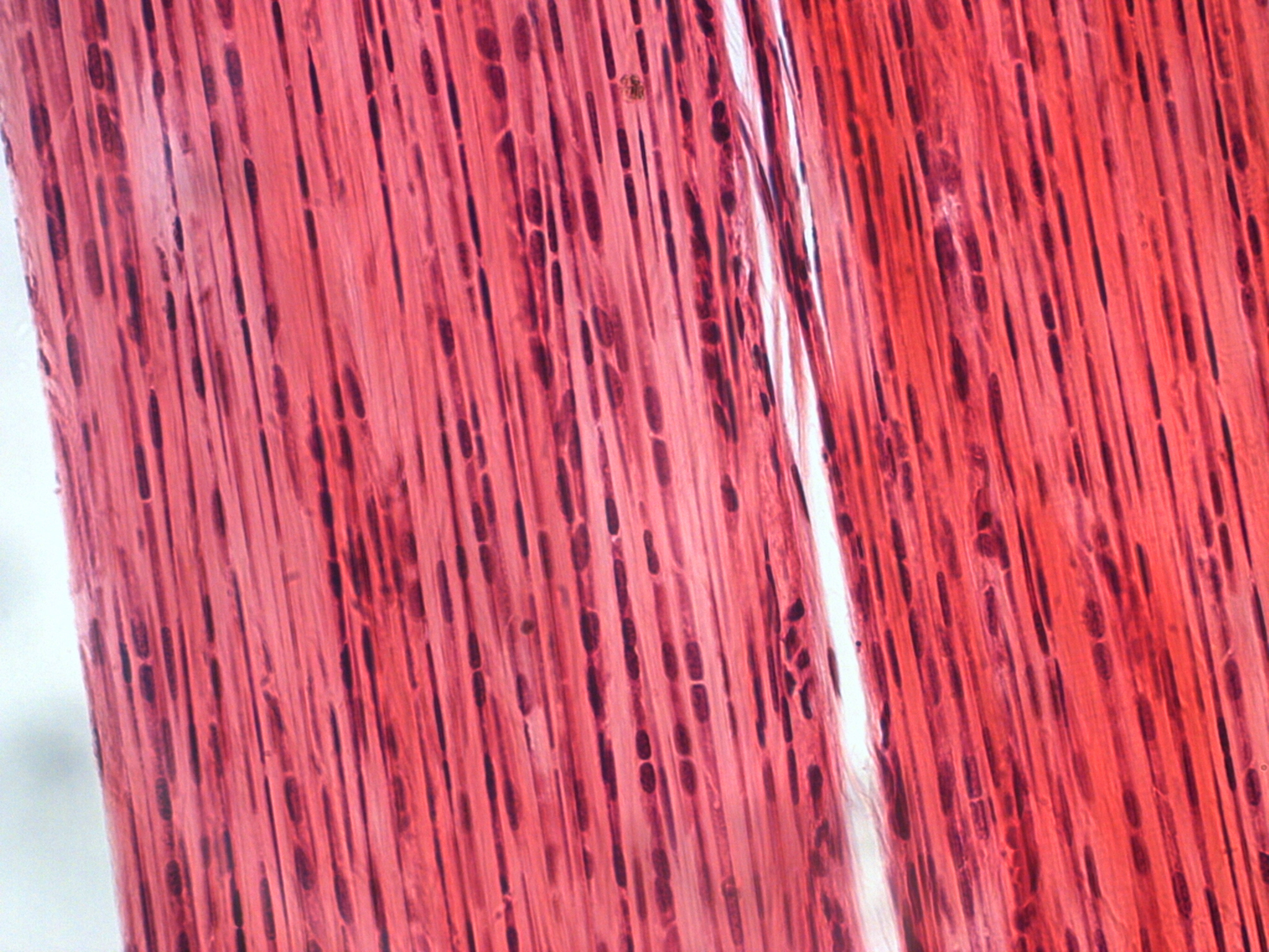 Blīvie noformētie saistaudi - cīpsla.